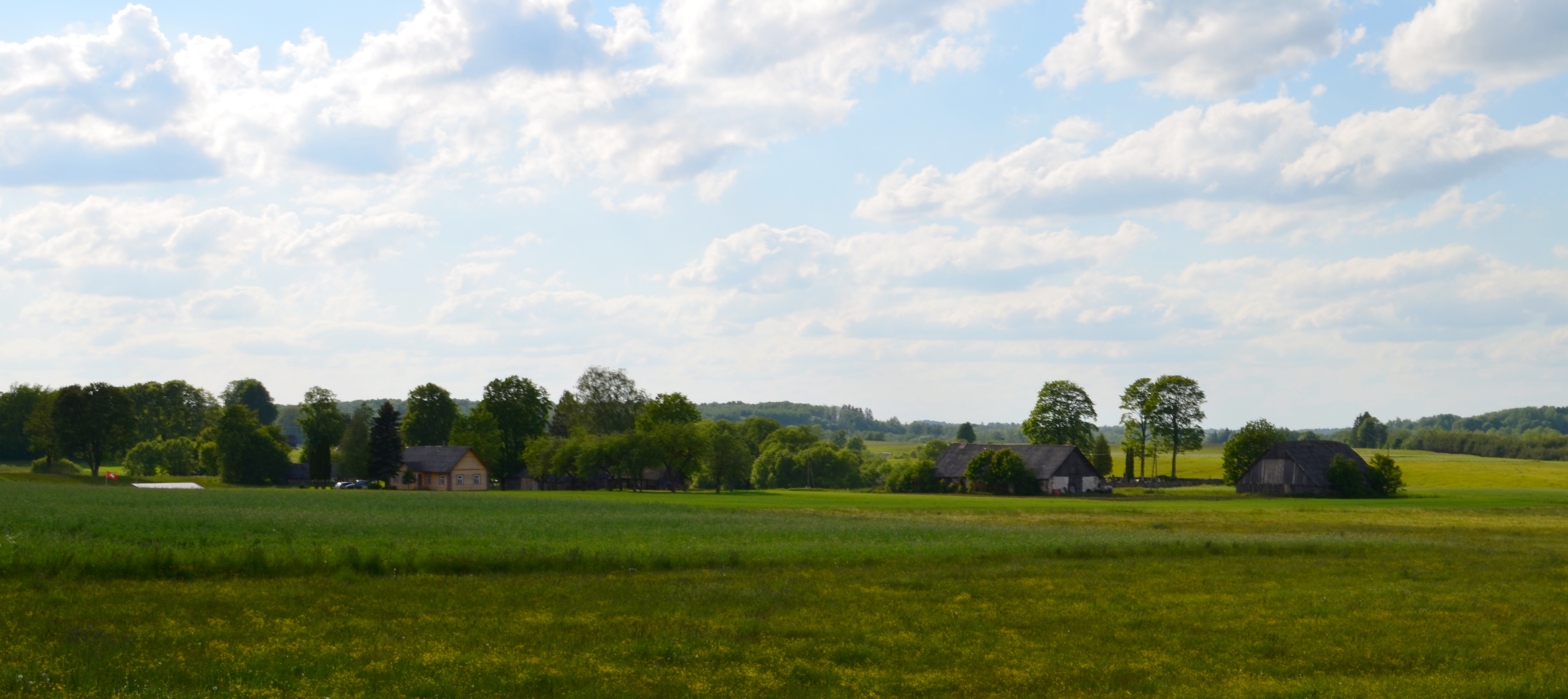 Laičiai, Molėtų raj.